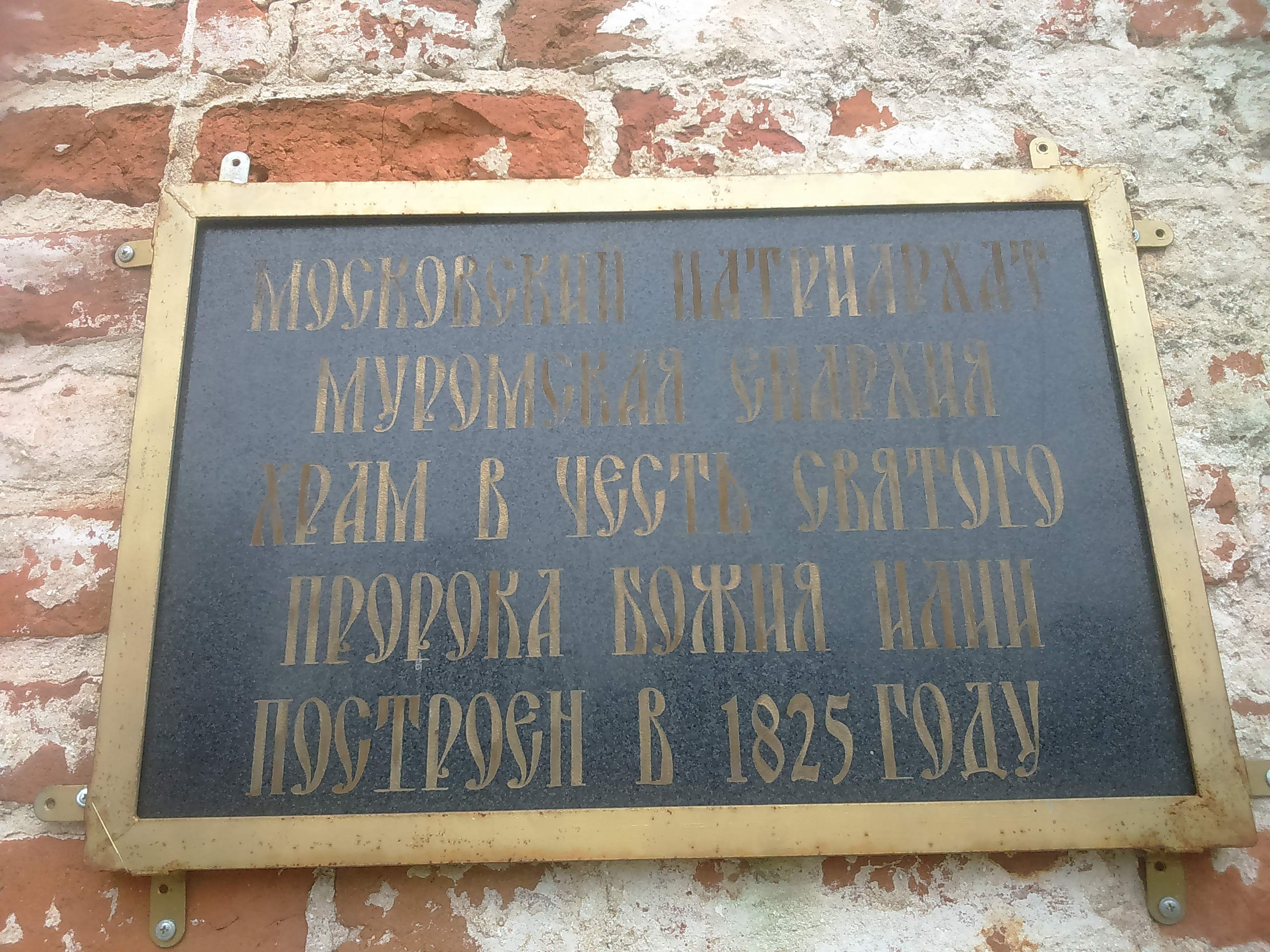 На храме Ильи пророка в селе Ильинском Селивановского района Владимирской области есть памятная табличка с указанием даты строительства храма